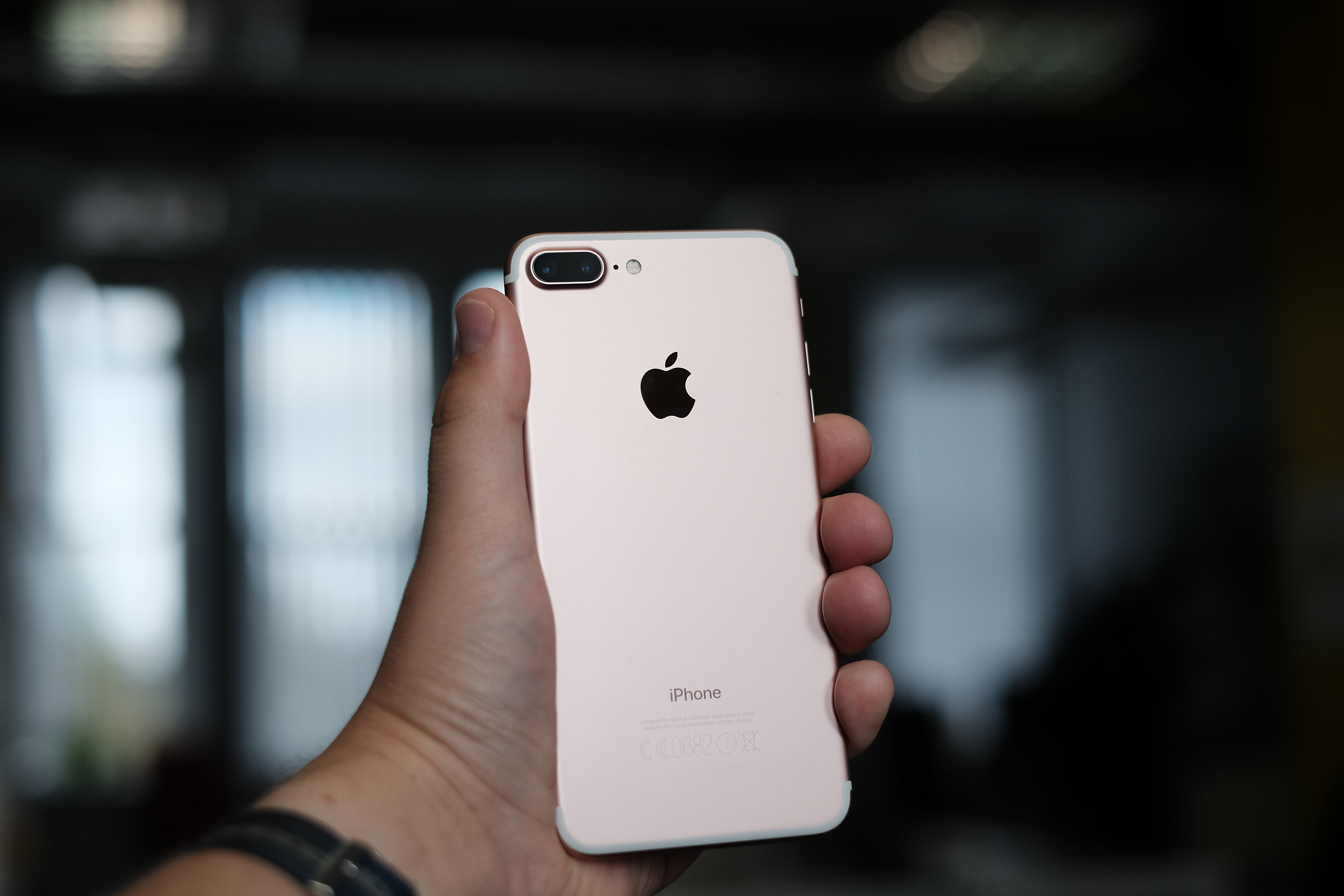 iPhone 7 Plus